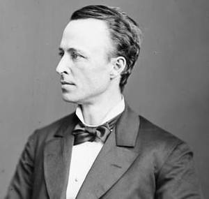 Georges Auguste Gigault, M.P., (Rouville, P.Q.)